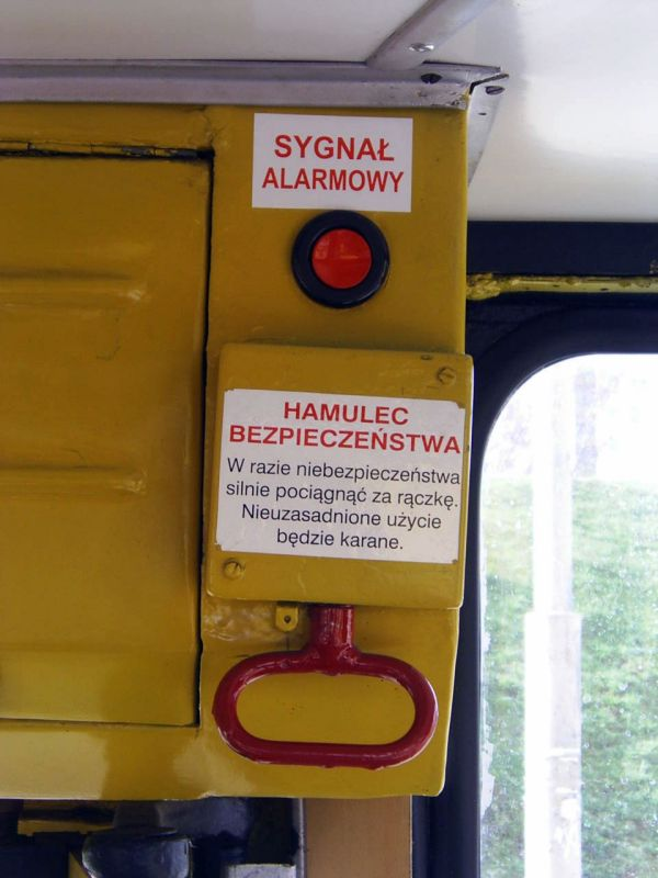 Tramwaje Warszawskie - Hamulec bezpieczeństwa